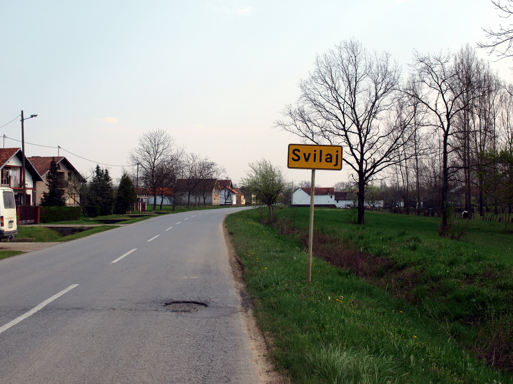 Ulaz u selo Svilaj, Brodsko-posavska županija.